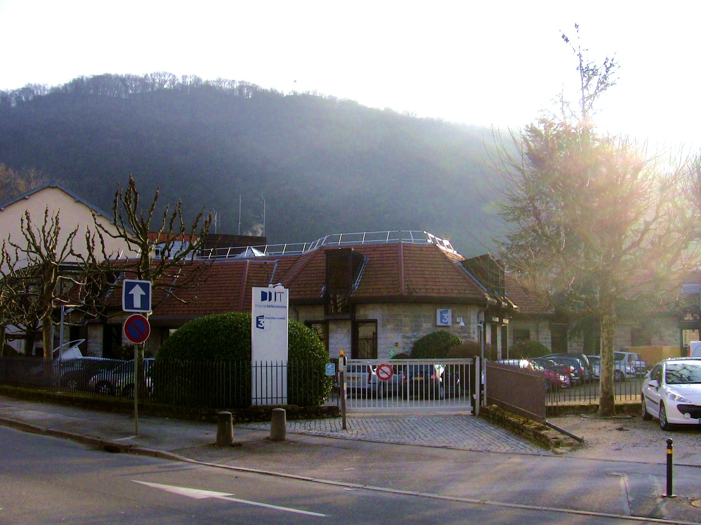 Le siège de France 3 Franche-Comté à Besançon (Doubs, France).